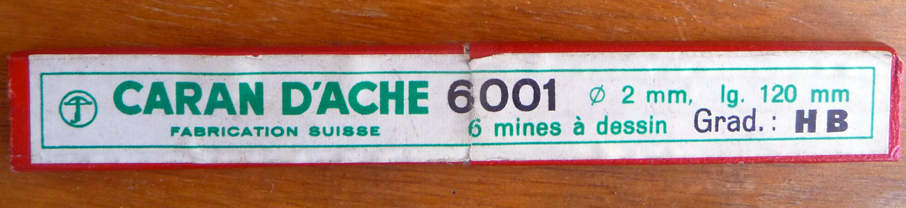 boitier de mines à dessin de la marque Caran d'Ache